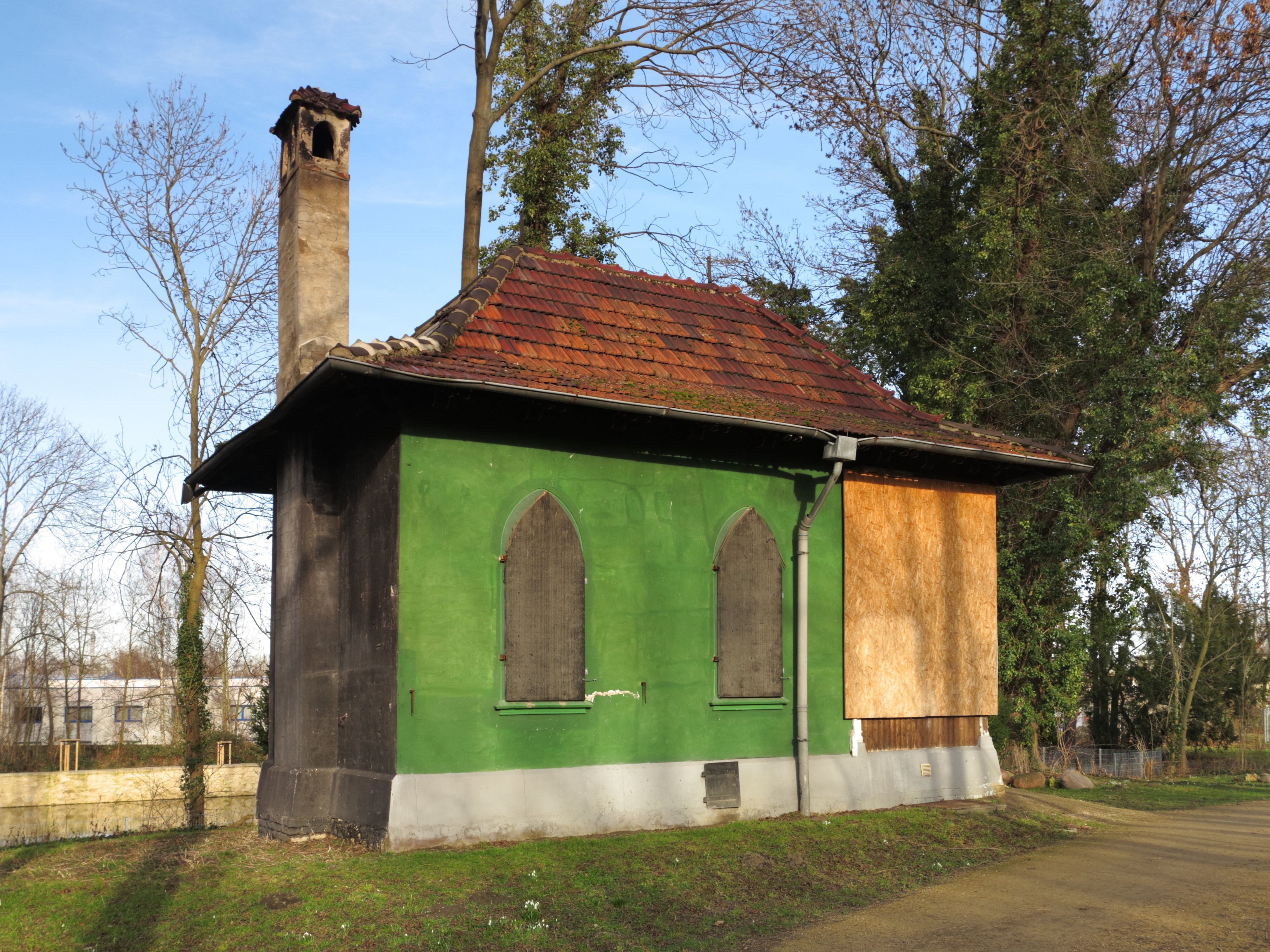 Braunschweig: das Kontorhaus am Jödebrunnen. Es wurde 1899 nach Plänen des Architekten und Maurermeisters F. Schönemann für die Holzhandlung Friedrich Brachvogel gebaut und als Büro und Freizeitpavillon genutzt. Die Veranda ist durch Holzplatten gegen Vandalismus gesichert (rechts im Bild).